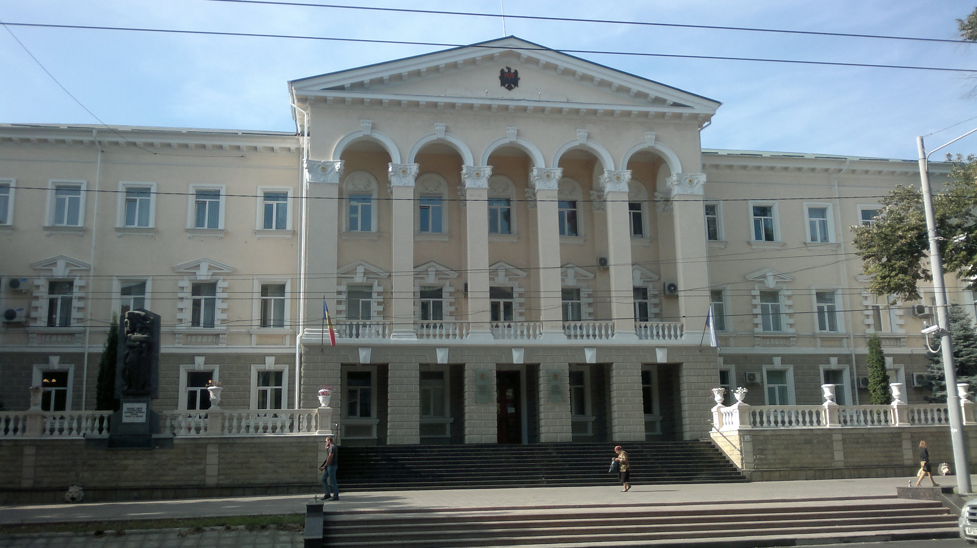 Sediul Ministerului Afacerilor Interne al Republicii Moldova